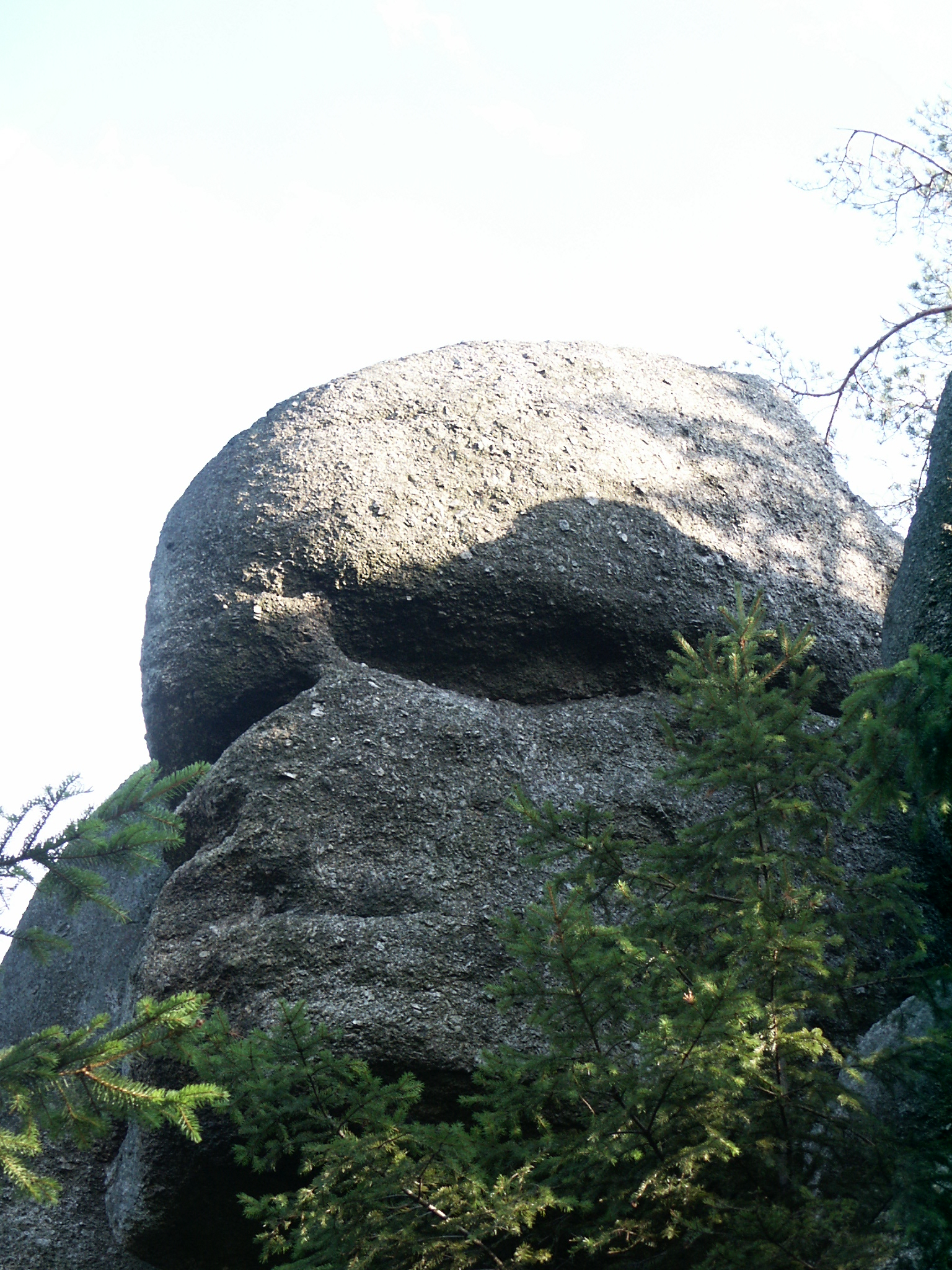 Totenkopfstein, bei Sankt Oswald im Bezirk Melk.